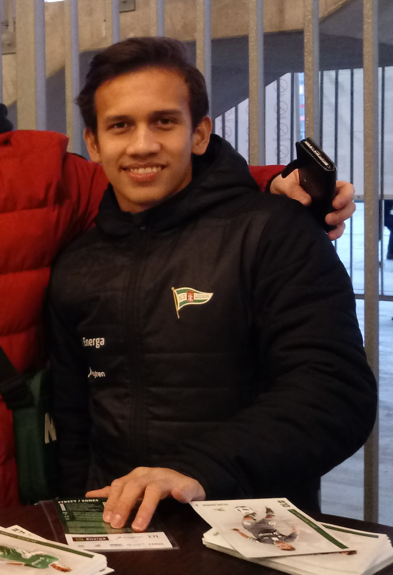 Egy Maulana - zawodnik Lechii Gdańsk